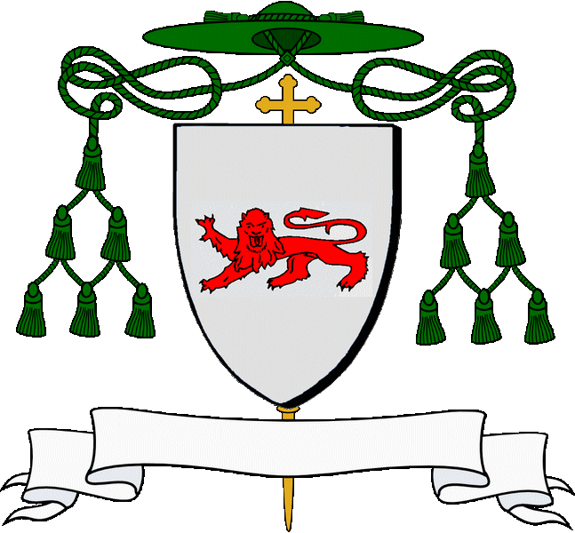 En argant e leonparzh en gwad